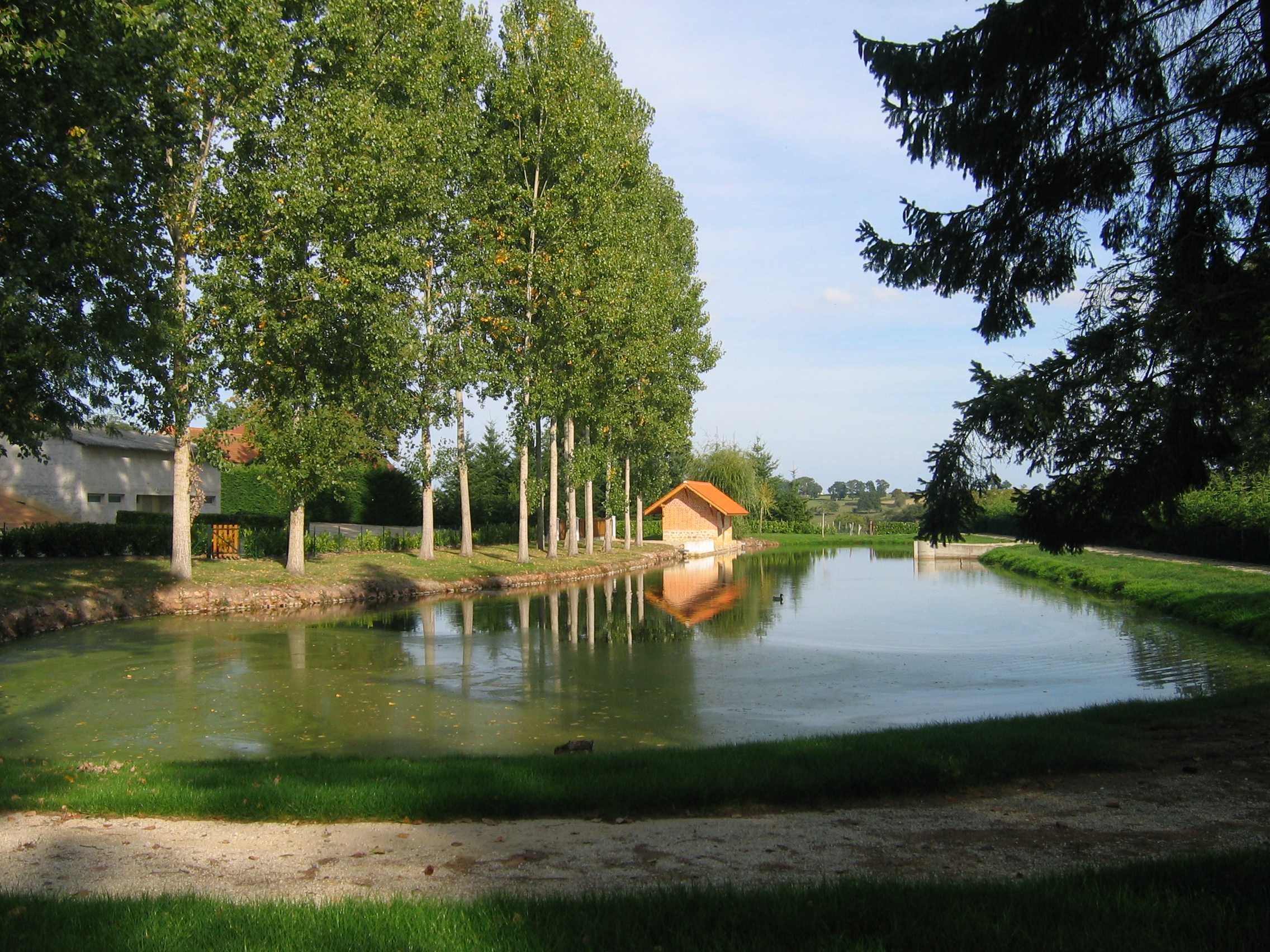 Plan d'eau des Bécauds (Neuilly en Donjon)